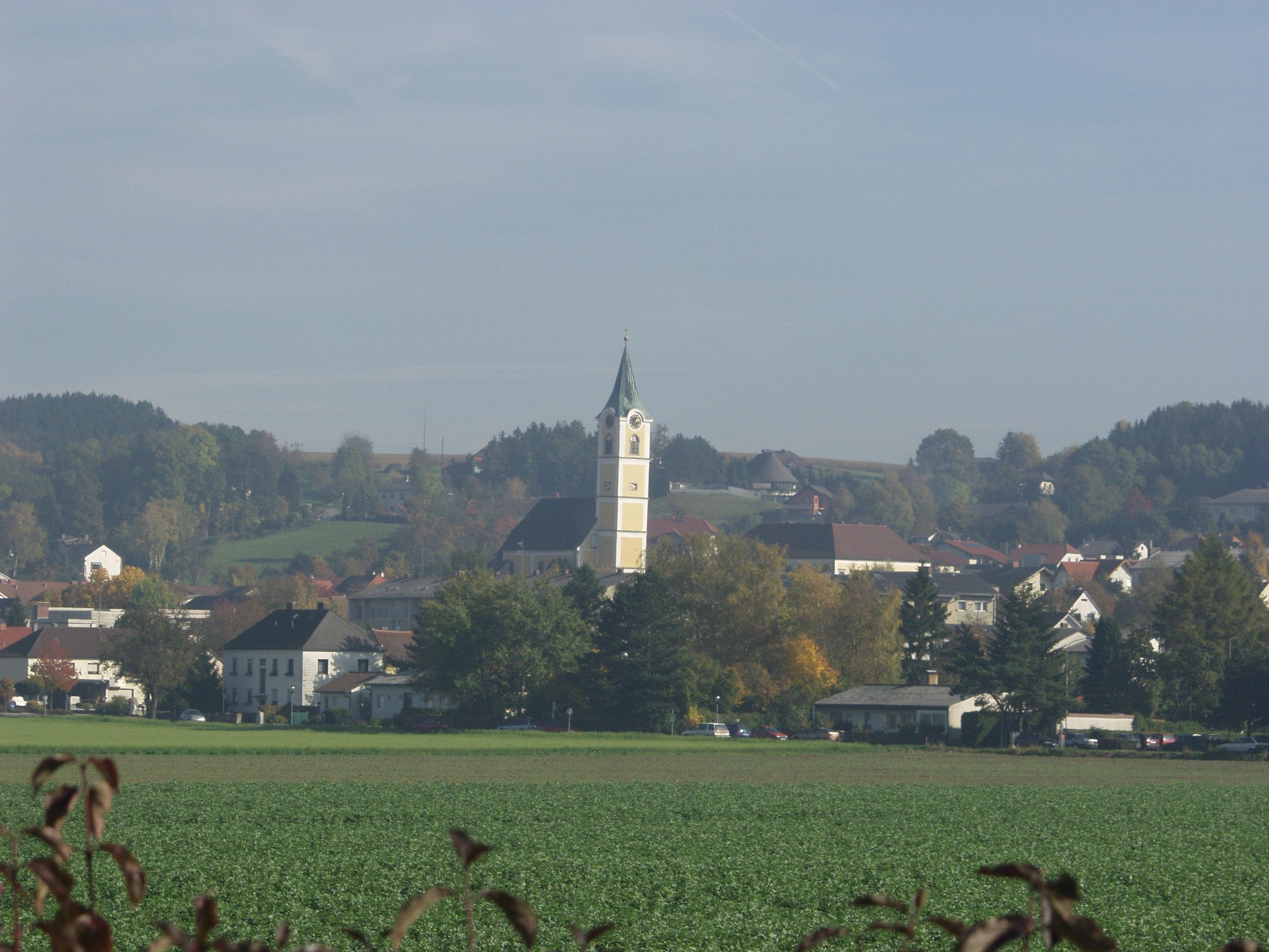 Ortschaft Ansfelden